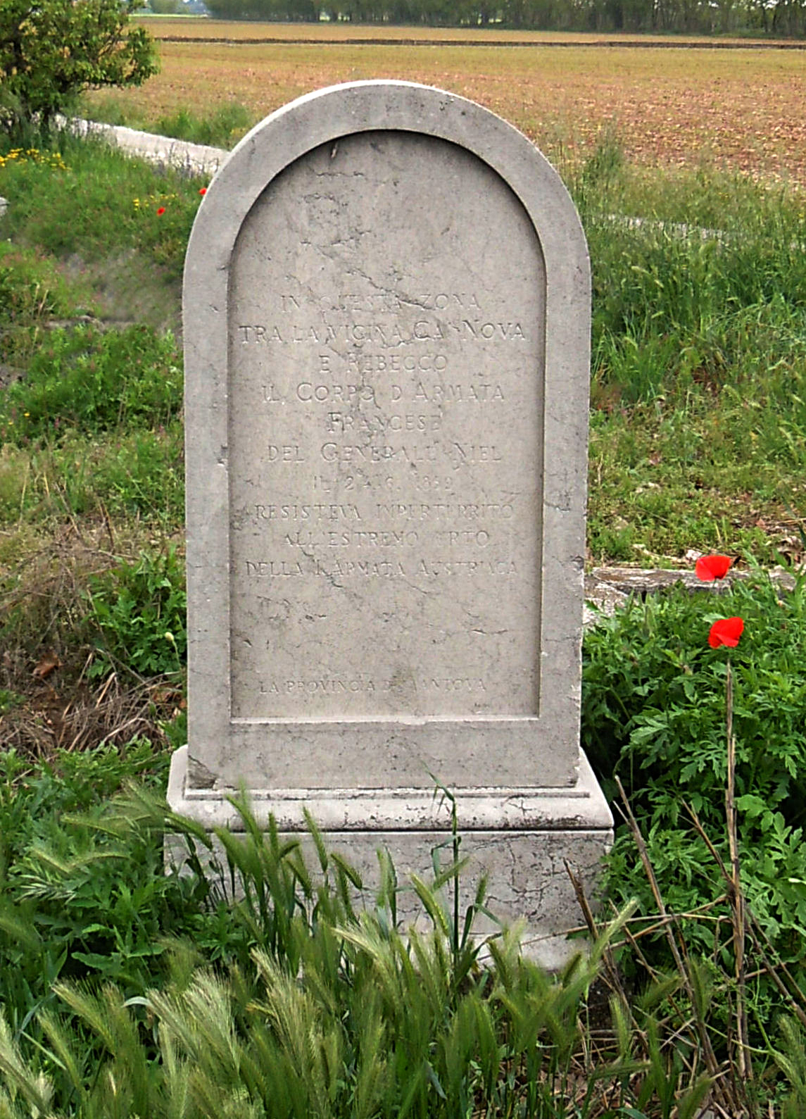 Medole, cippo a ricordo del generale Niel 24-6-1859.